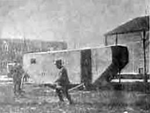 Rouleau_cuirasse_Paul_Frot